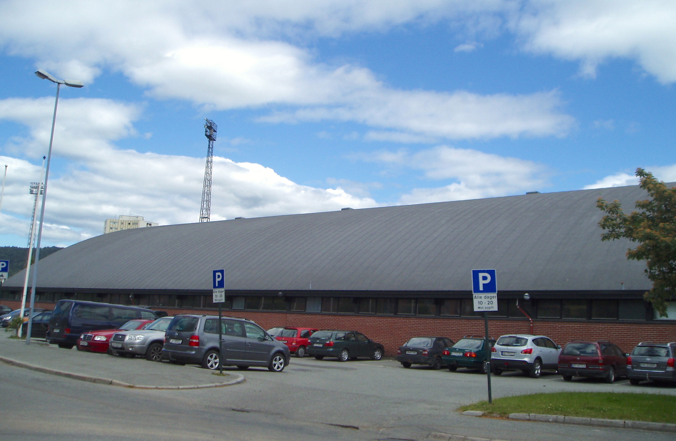 Drammenshallen, idrettshall i Drammen, Norge.